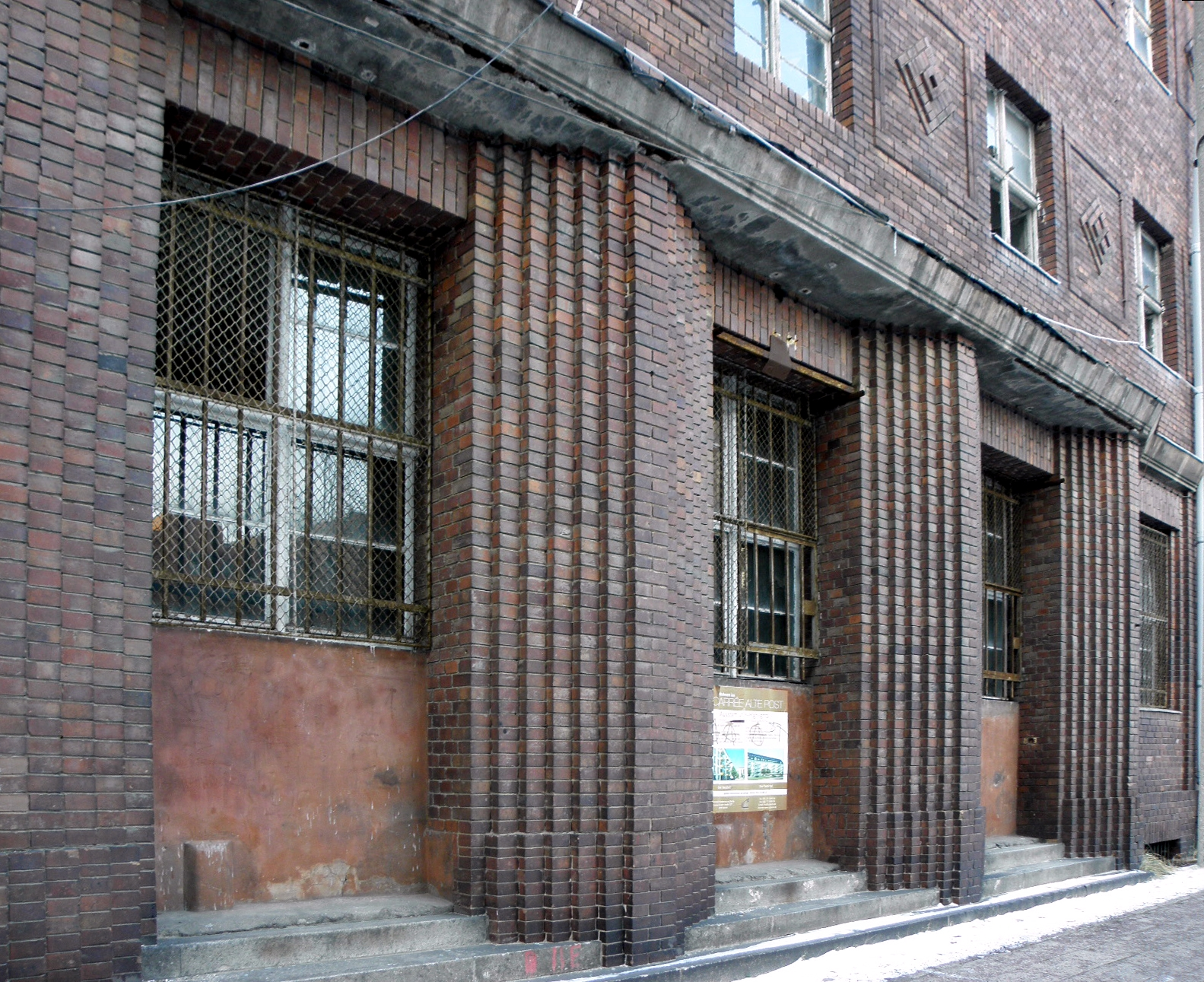 Historisches Postamt Lichtenberg 1: Hauptportal